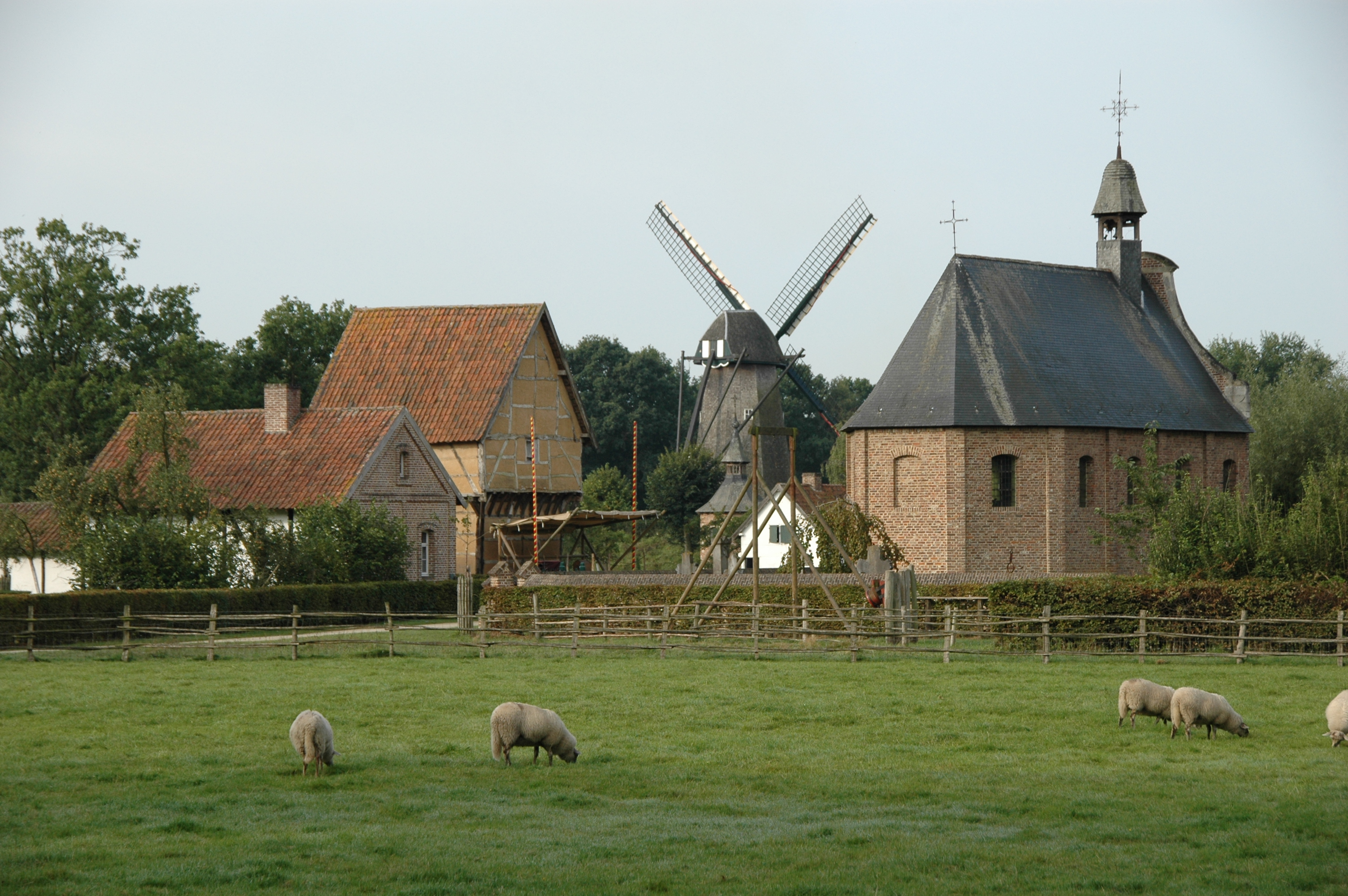 Bokrijk, Openluchtmuseum Bokrijk, zicht op dorpskern Haspengouws museumdeel